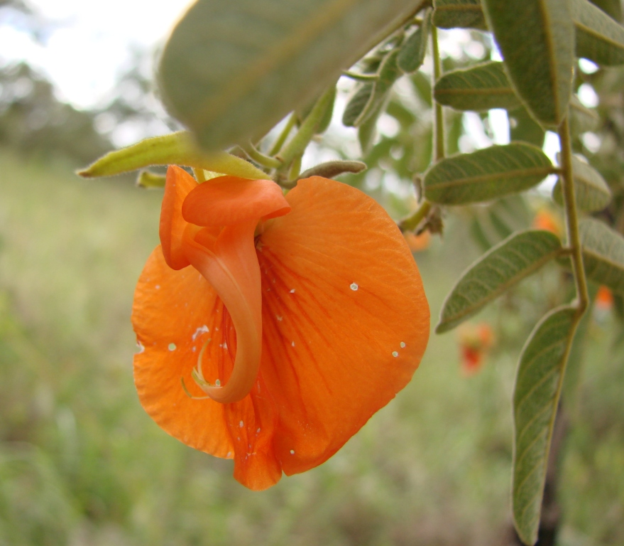 Harpalyce brasiliana - FABACEAE - Chapada Imperial - DF- Brasil